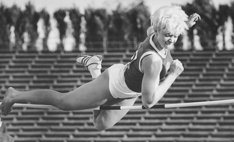 Karin Rüger Zentralbild Wendorf 25.9.1964 Spitzensportler der DDR Karin Rüger (Hochsprung) SC DHfK Leipzig.